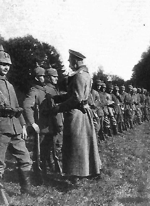 Kronprinzen-Parade im Park von Charmois